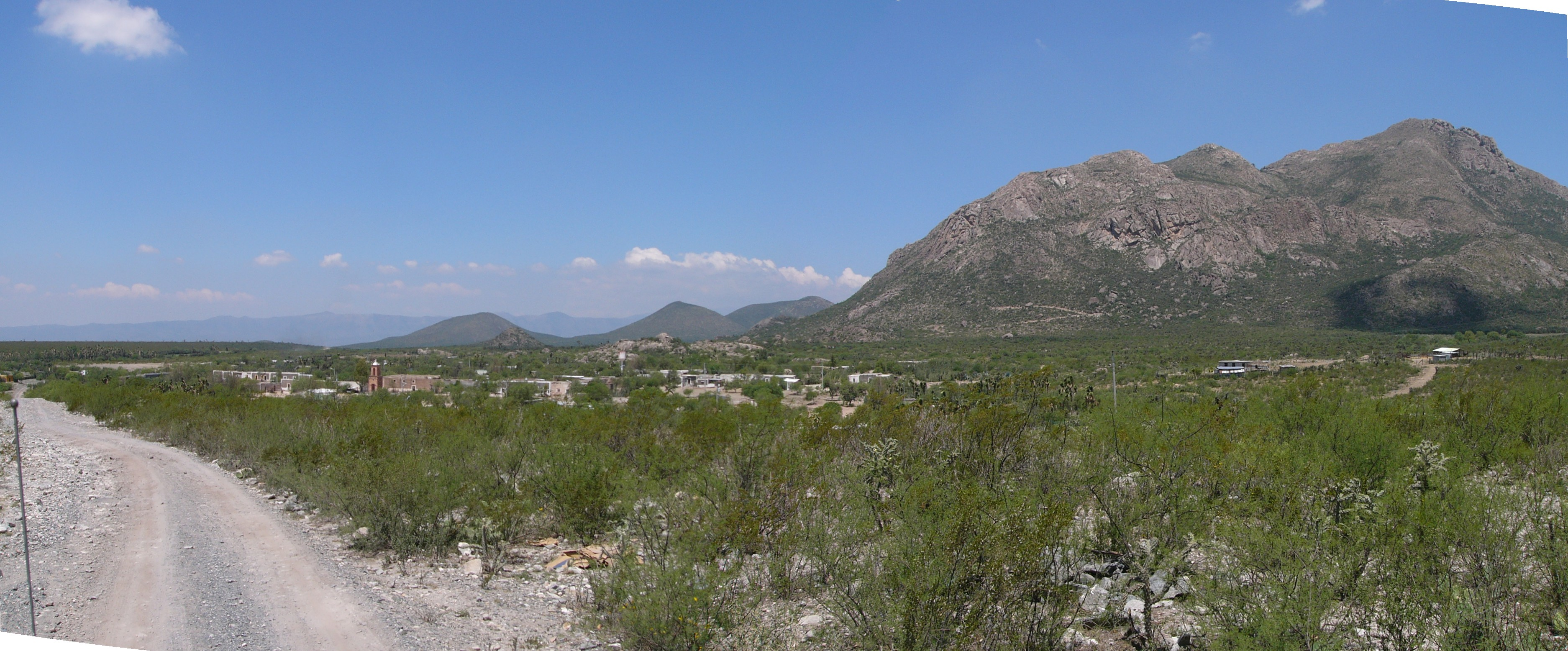 El Peñuelo, Galeana Nuevo León